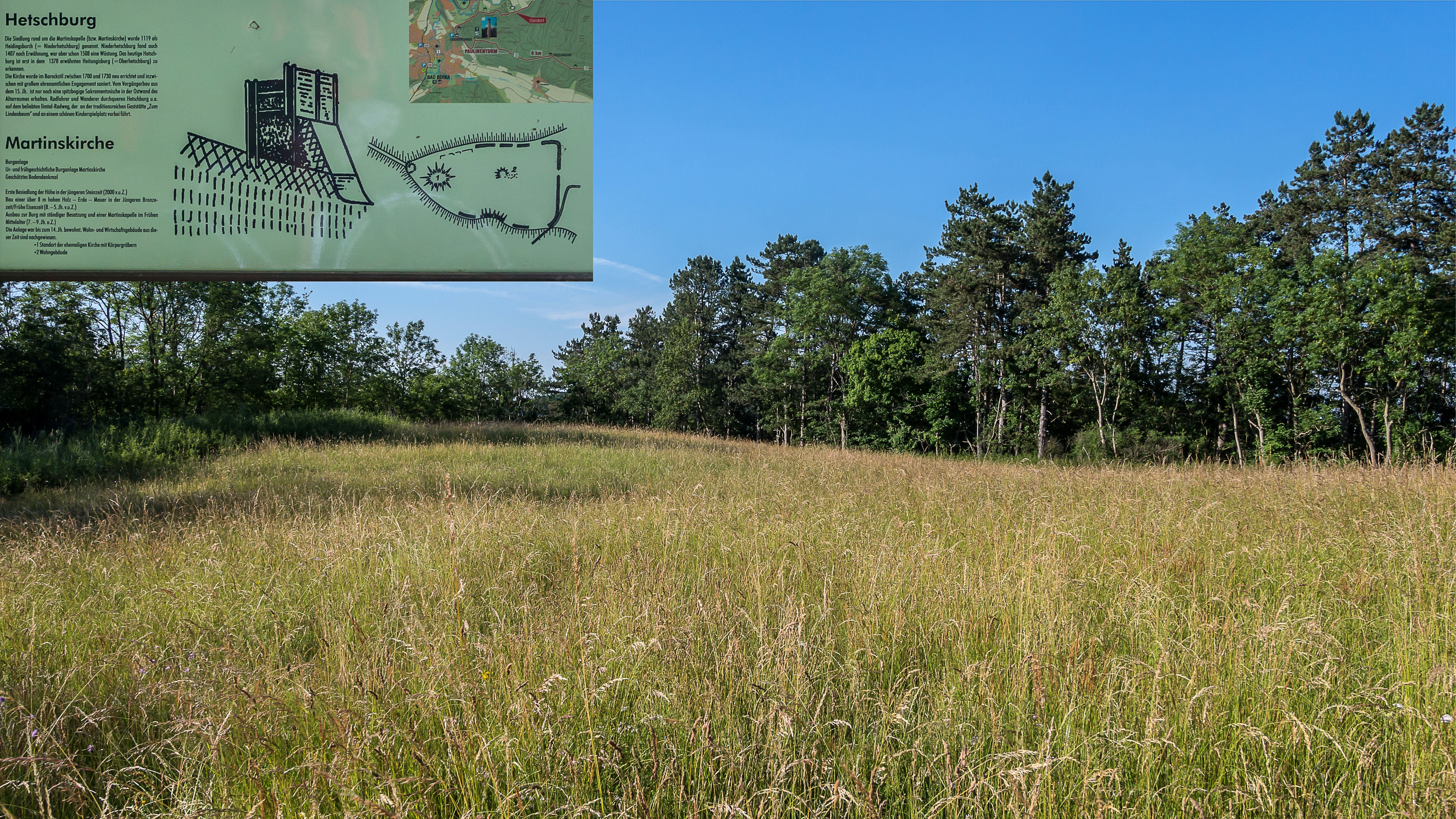 Hetschburg Nach Norden ins Ilmtal vorspringender und sich allmählich verjüngender, unregelmäßig geformter Bergsporn von ca. 60 m Höhe Wallburg, Martinskirche Infotafel eingefügt